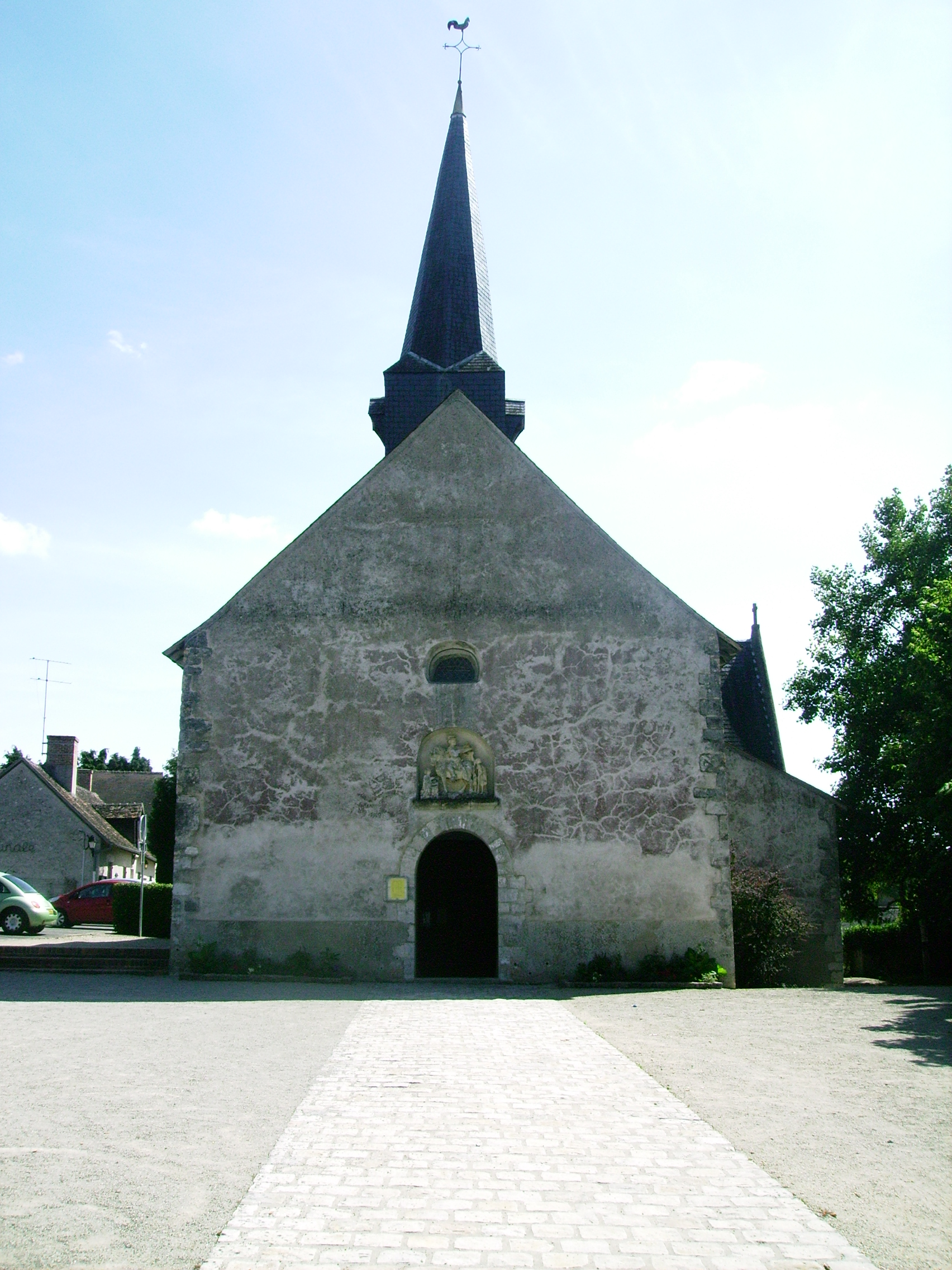 L'eglise de Crouy-sur-Cosson